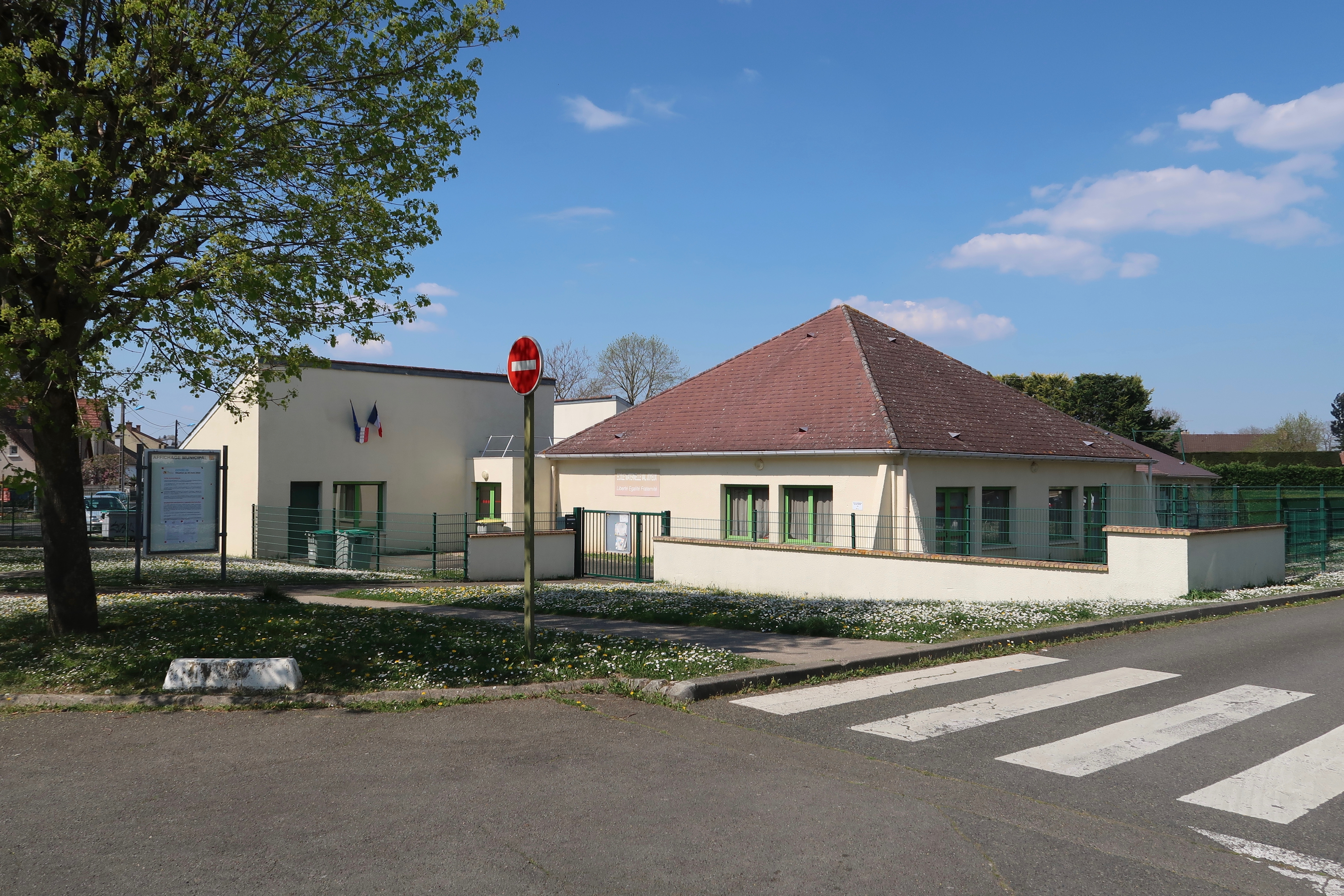 École maternelle du Val-Joyeux, 1 avenue de l'Image-Notre-Dame, à Villepreux (Yvelines).